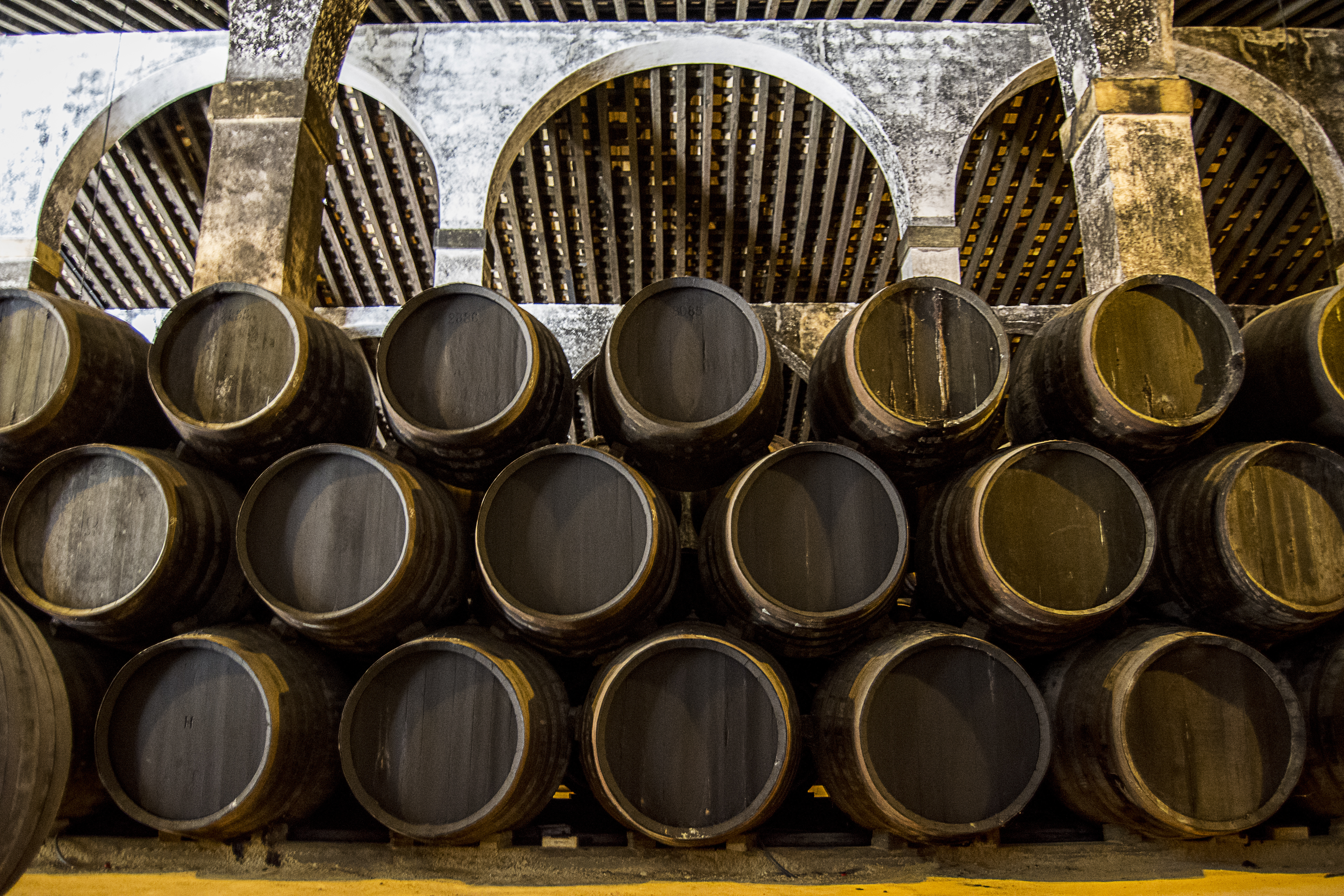 Interior de las bodegas Lustau en Jerez de la Frontera.